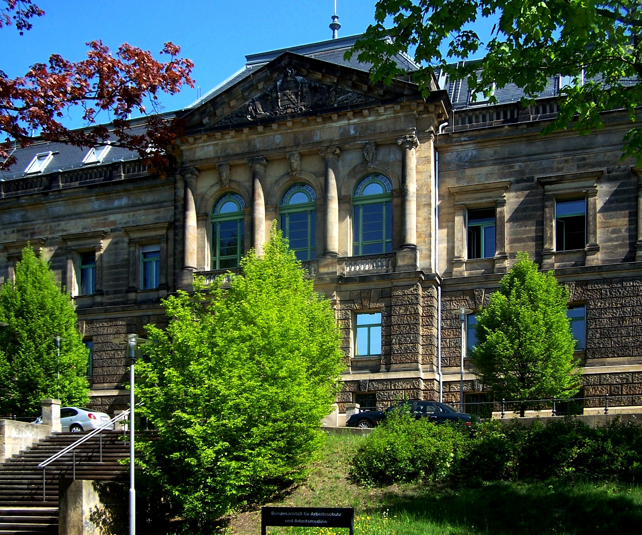 Heute eine Niederlassung der Bundesanstalt für Arbeitsschutz und Arbeitsmedizin